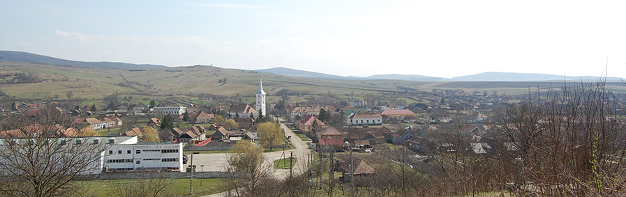 Batoș/Bátos/Botsch in Romania